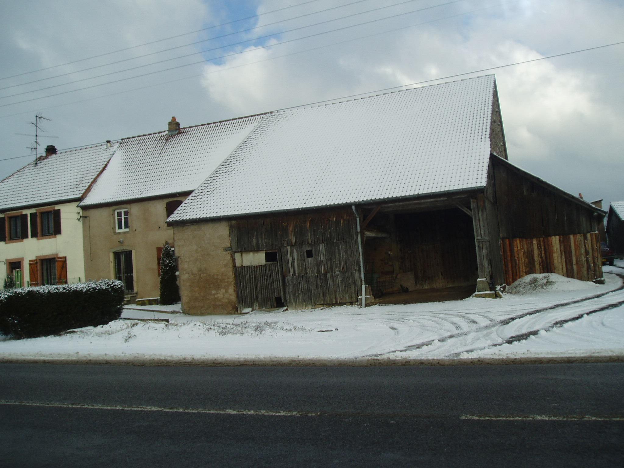 Maison à Schopp, Danne-et-Quatre-Vents, Moselle